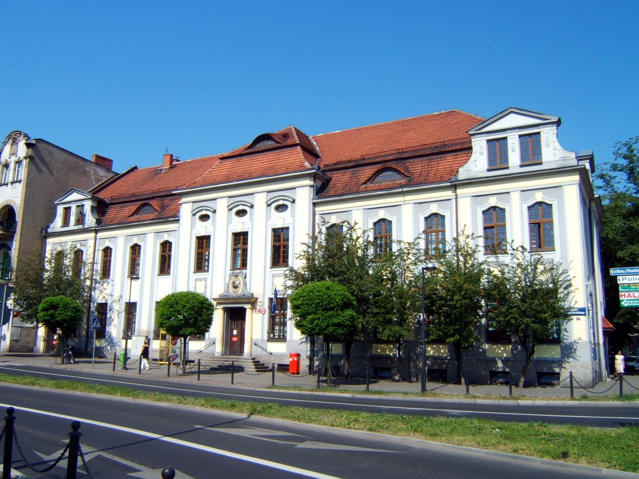 Urząd pocztowy w Tarnowskich Górach, Polska